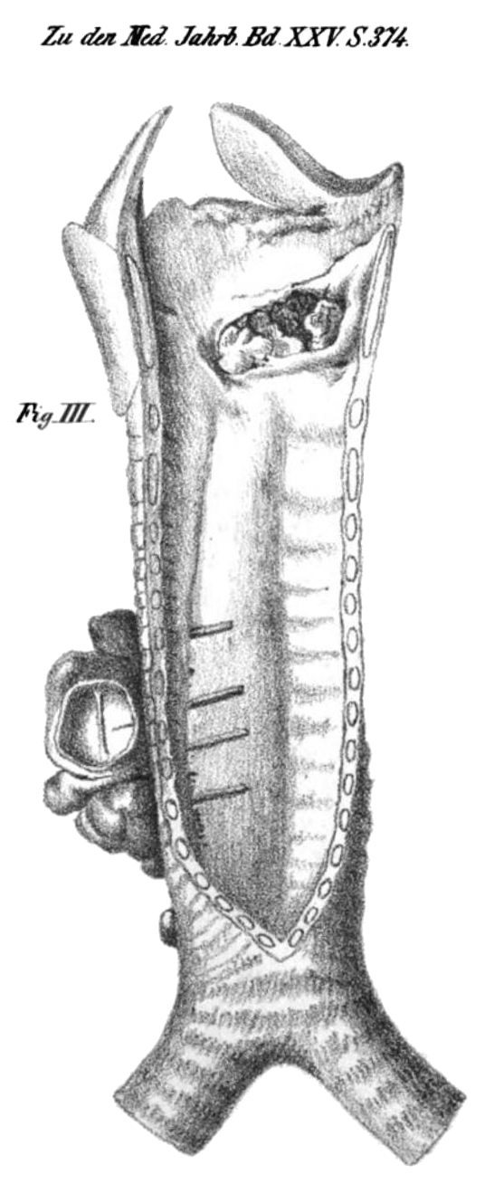 Retouchierter Scan einer Abbildung aus "Über die divertikel-ähnliche Erweiterung des Luftröhrenkanals - Rokitansky 1838 - Fig III" in "Medicinische Jahrbücher des kaiserl.-königl. österreichischen Staates, Band 16"